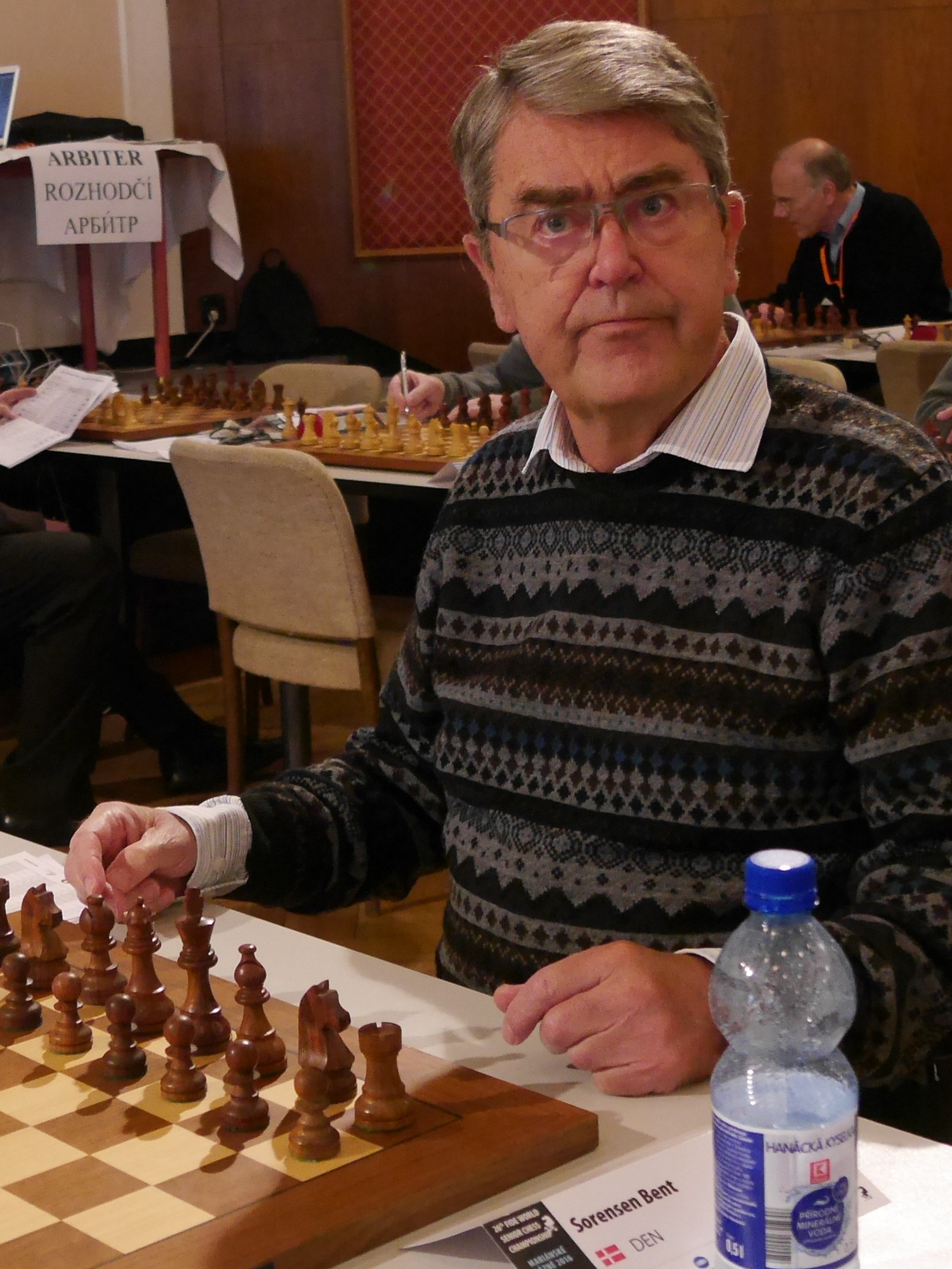 Bent Sorensen, Schachweltmeisterschaft der Senioren 2016 in Marienbad.